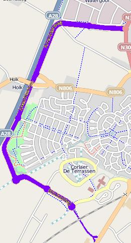 De rondweg Arkemheenweg van de Gelderse stad Nijkerk.